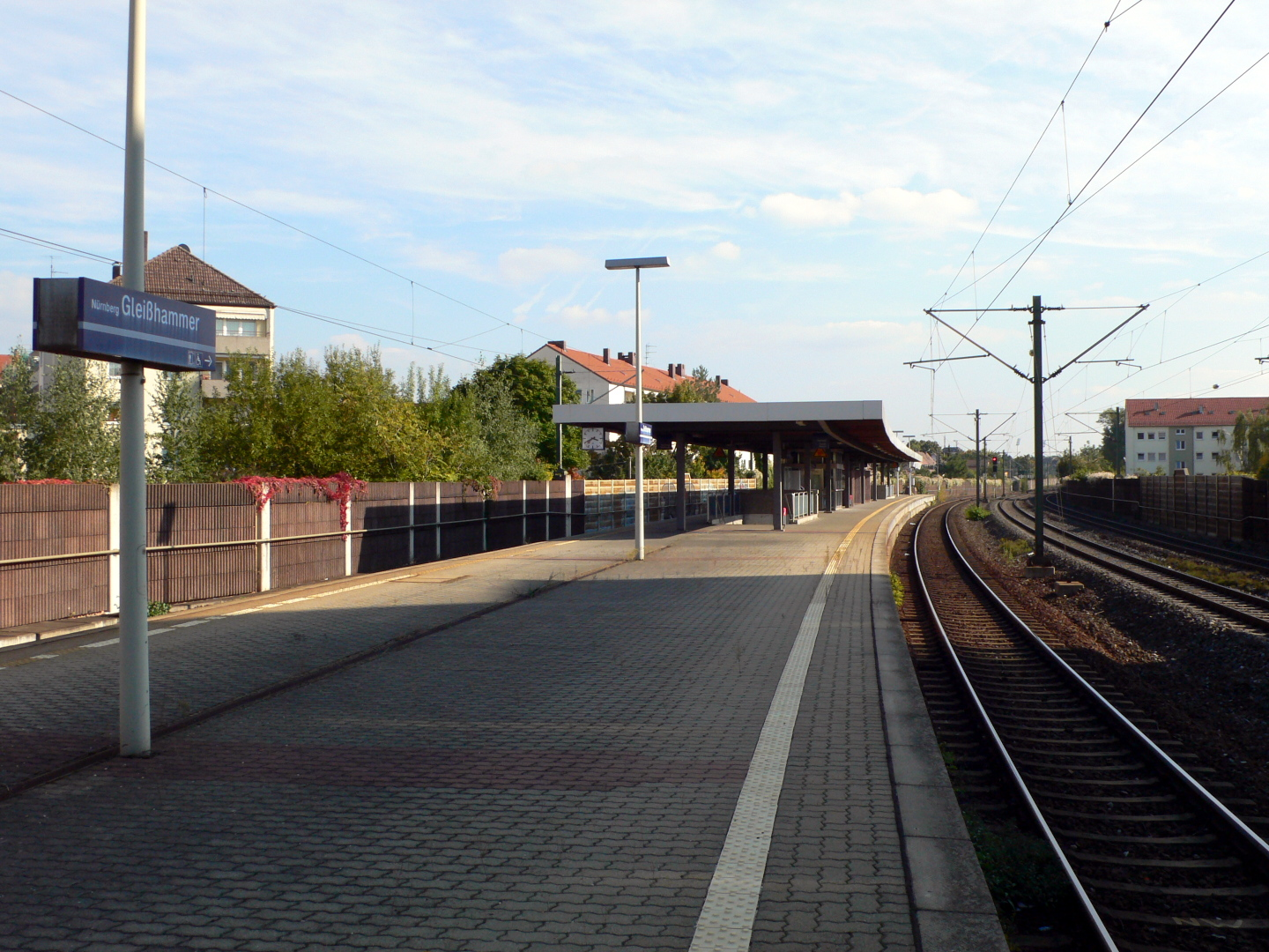 Haltepunkt Nürnberg-Gleißhammer, Blick von Norden auf den Bahnsteig